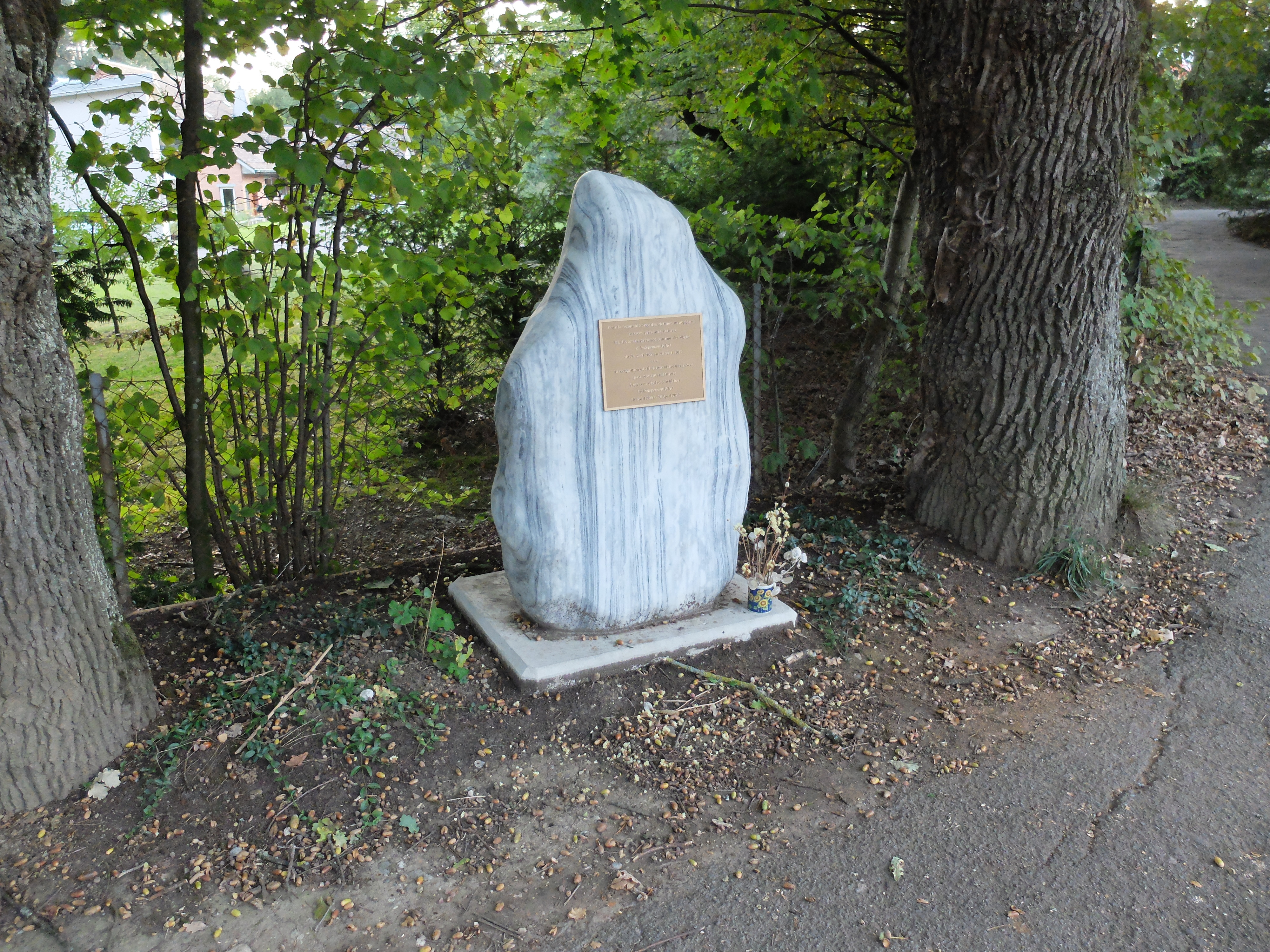 Stèle pour la reconnaissance des victimes du nucléaire, posée par Indepentant WHO